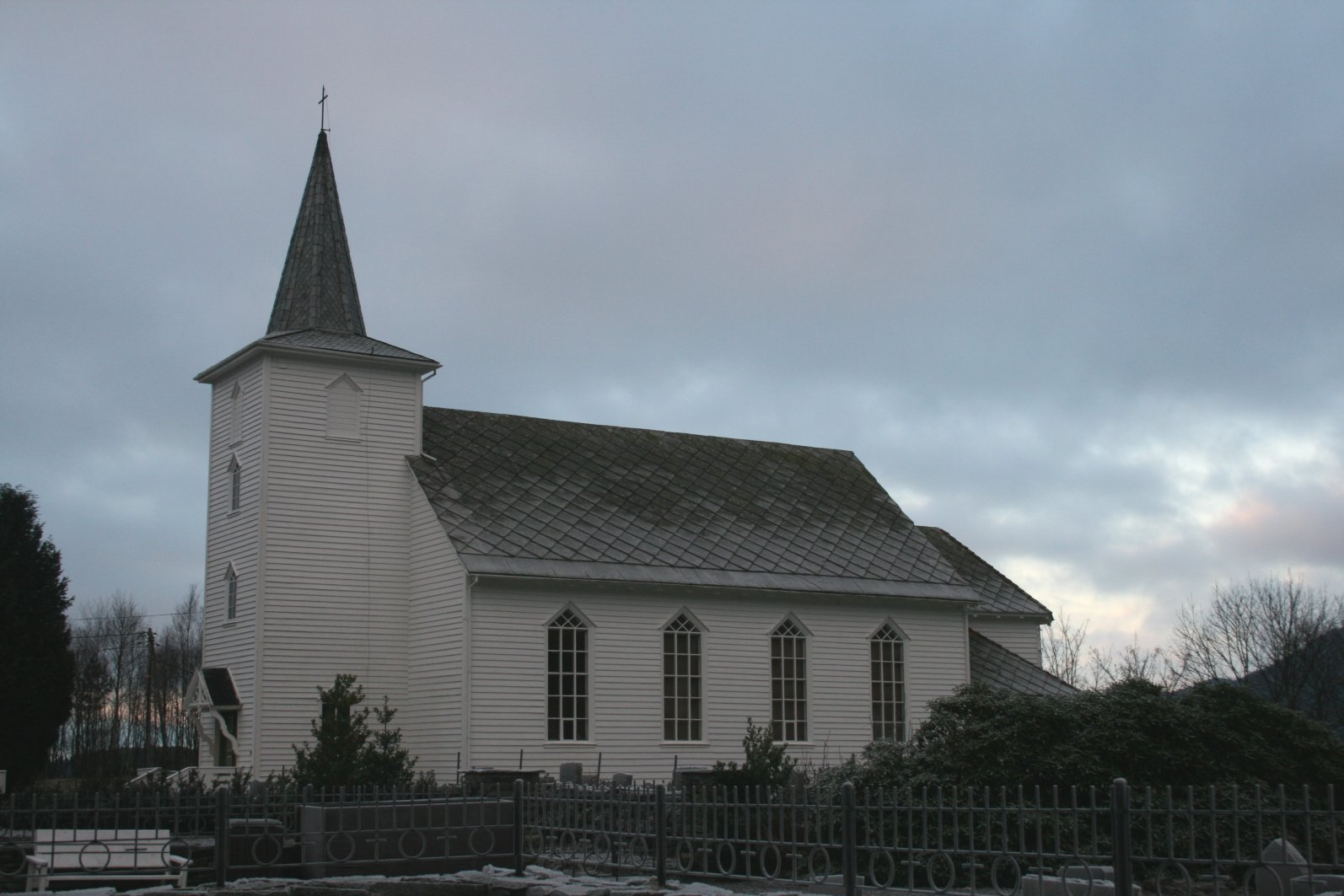 Valestrand kirke